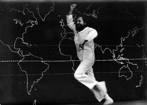 Jorge Bonino - 1969 - Artista conceptual argentino (1935-1990)